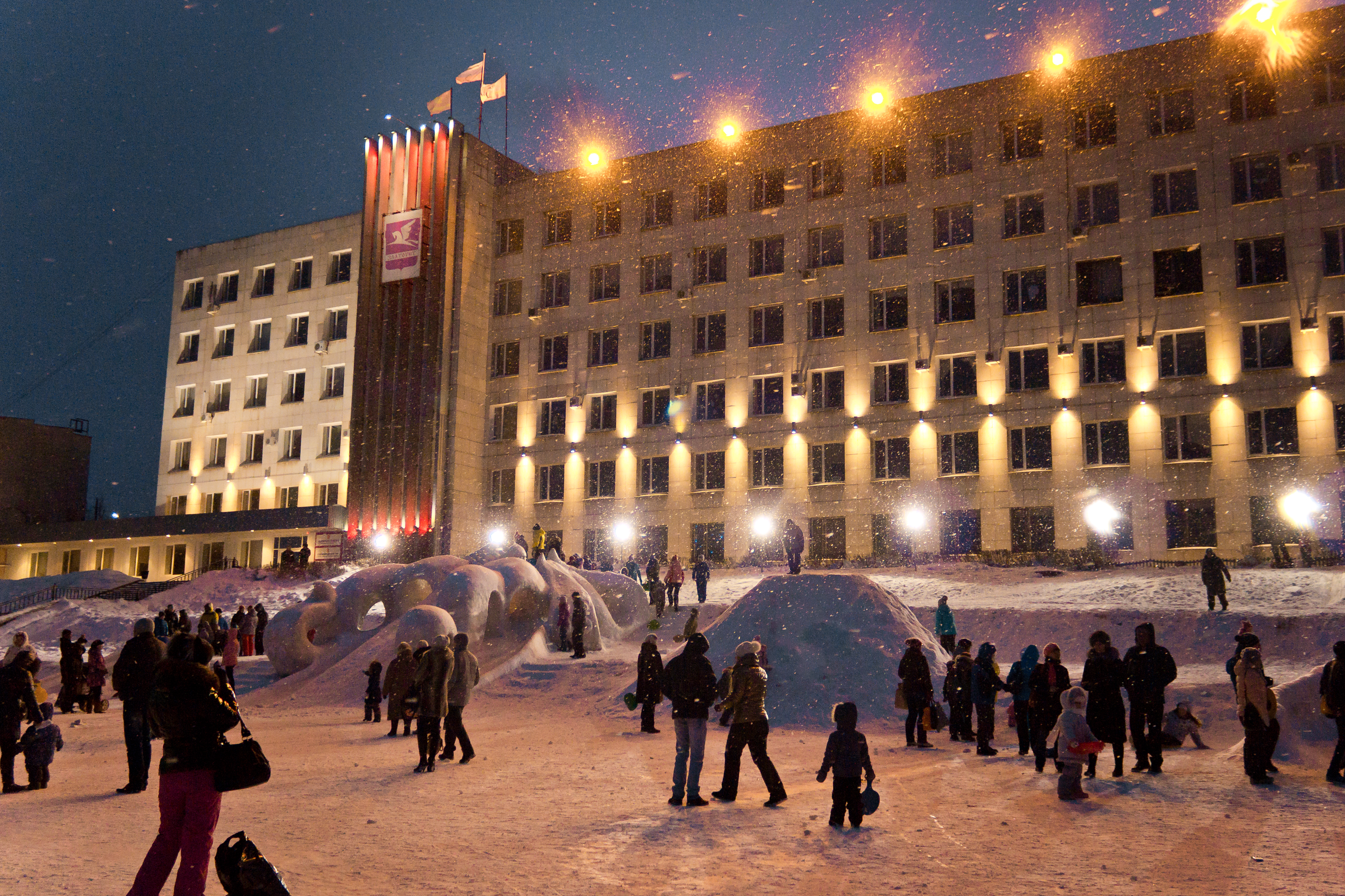 Новогодняя площадь